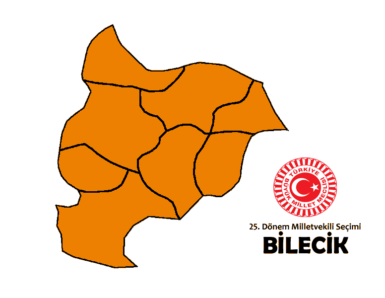 2015 genel seçim sonuçları